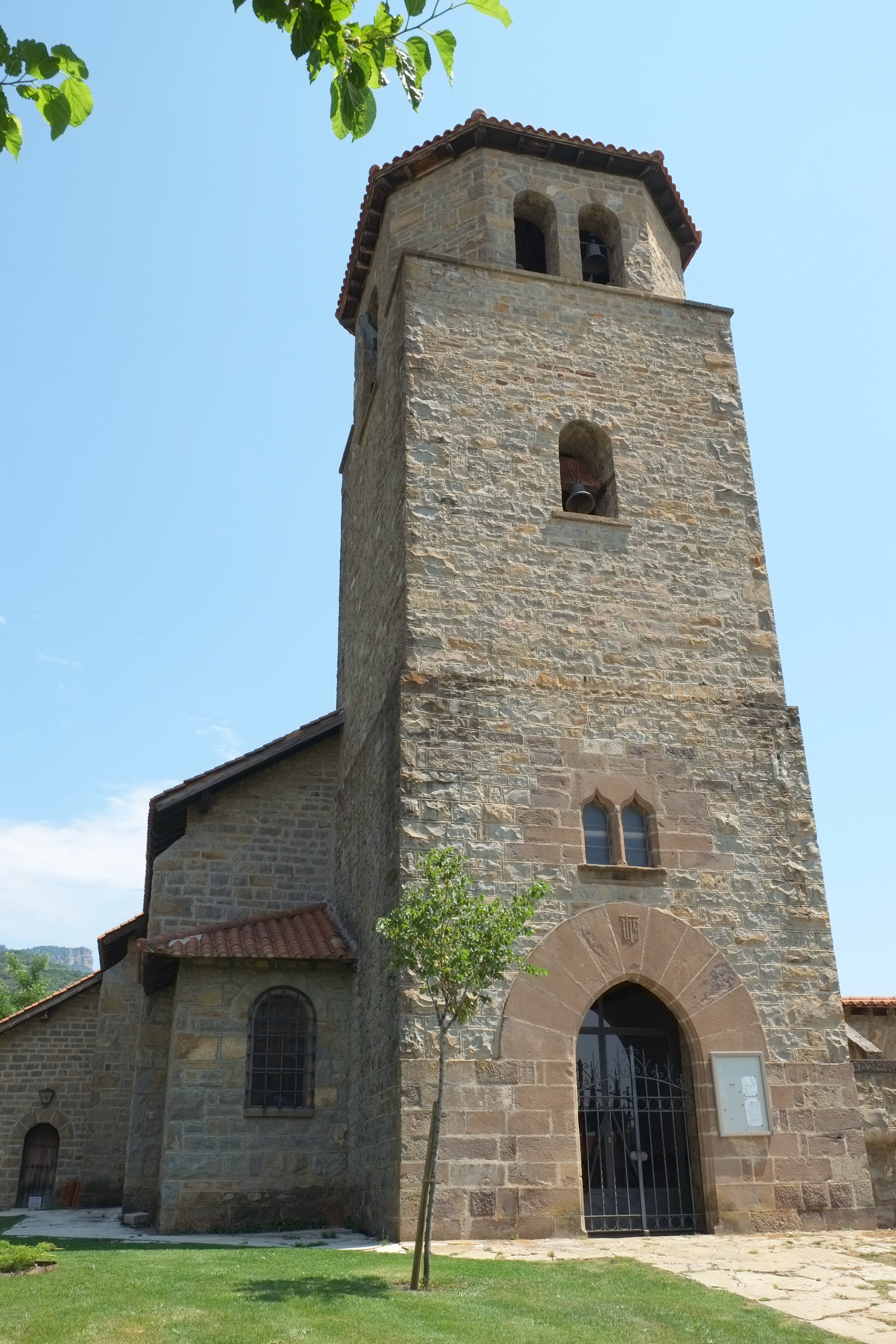 Kirche San Esteban in Yesa in Navarra (Spanien)